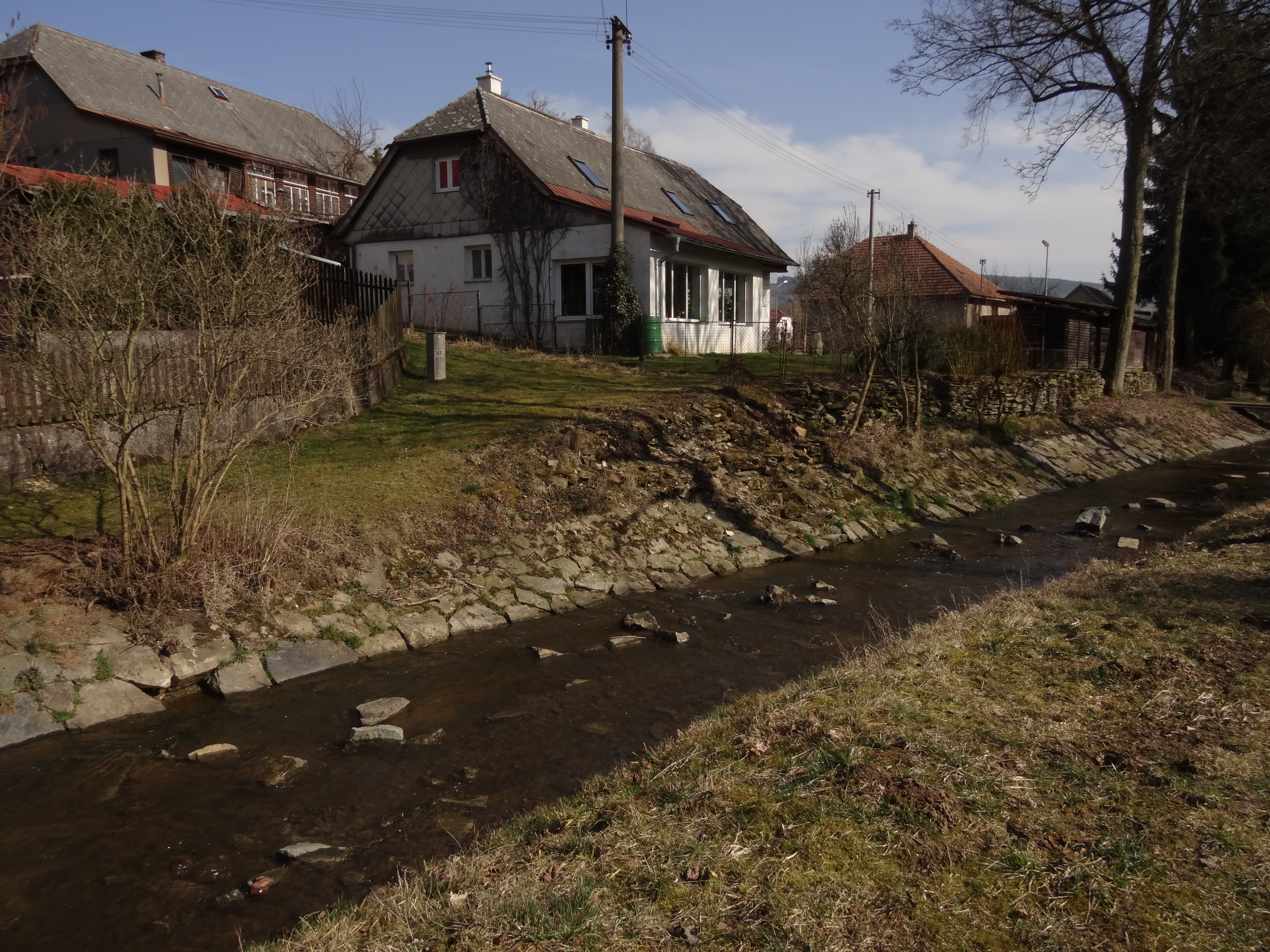 Víska u Chotěboře - Novoveský potok a čp. 27